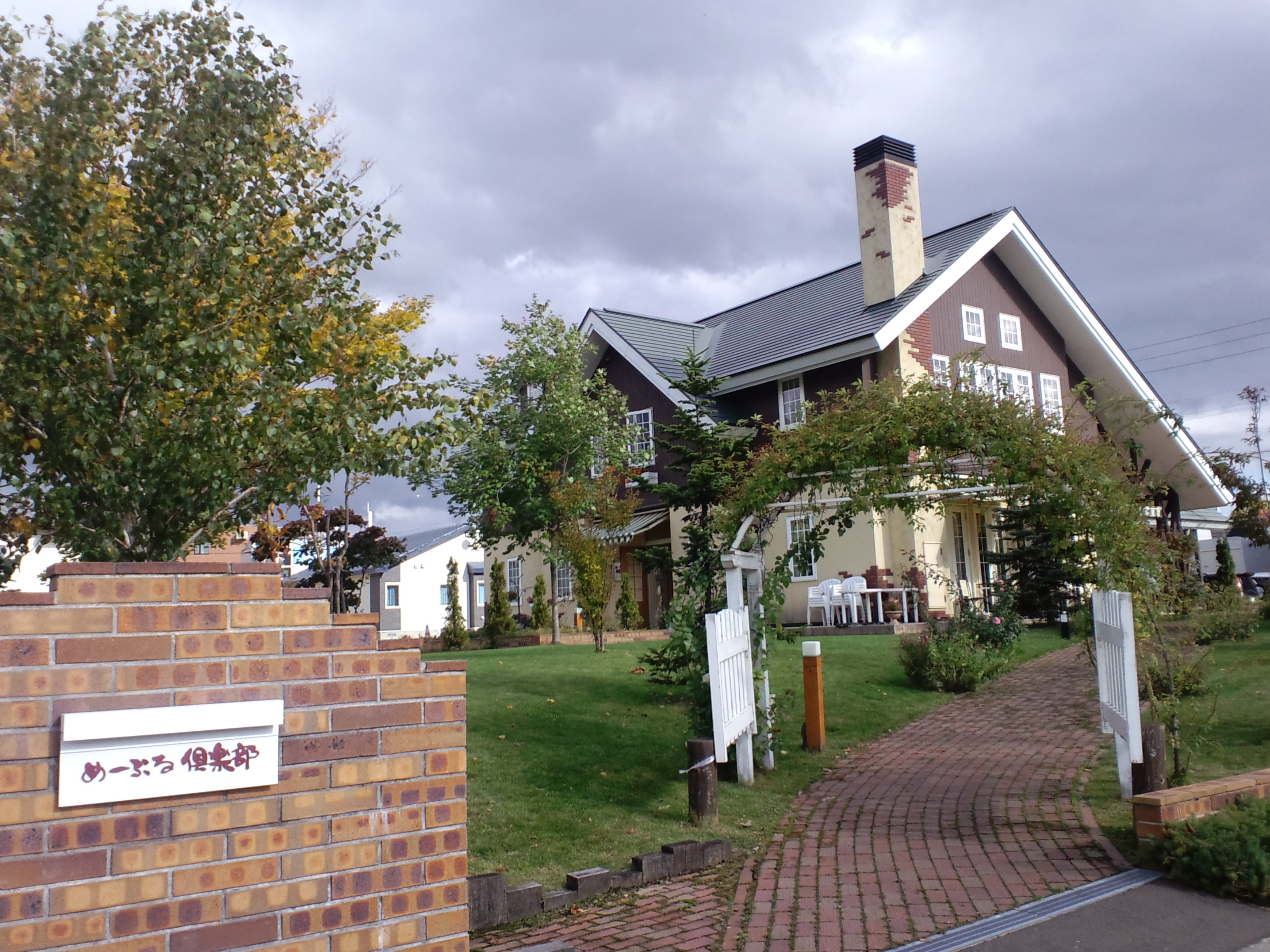 赤いリボン・めーぷる倶楽部春日店